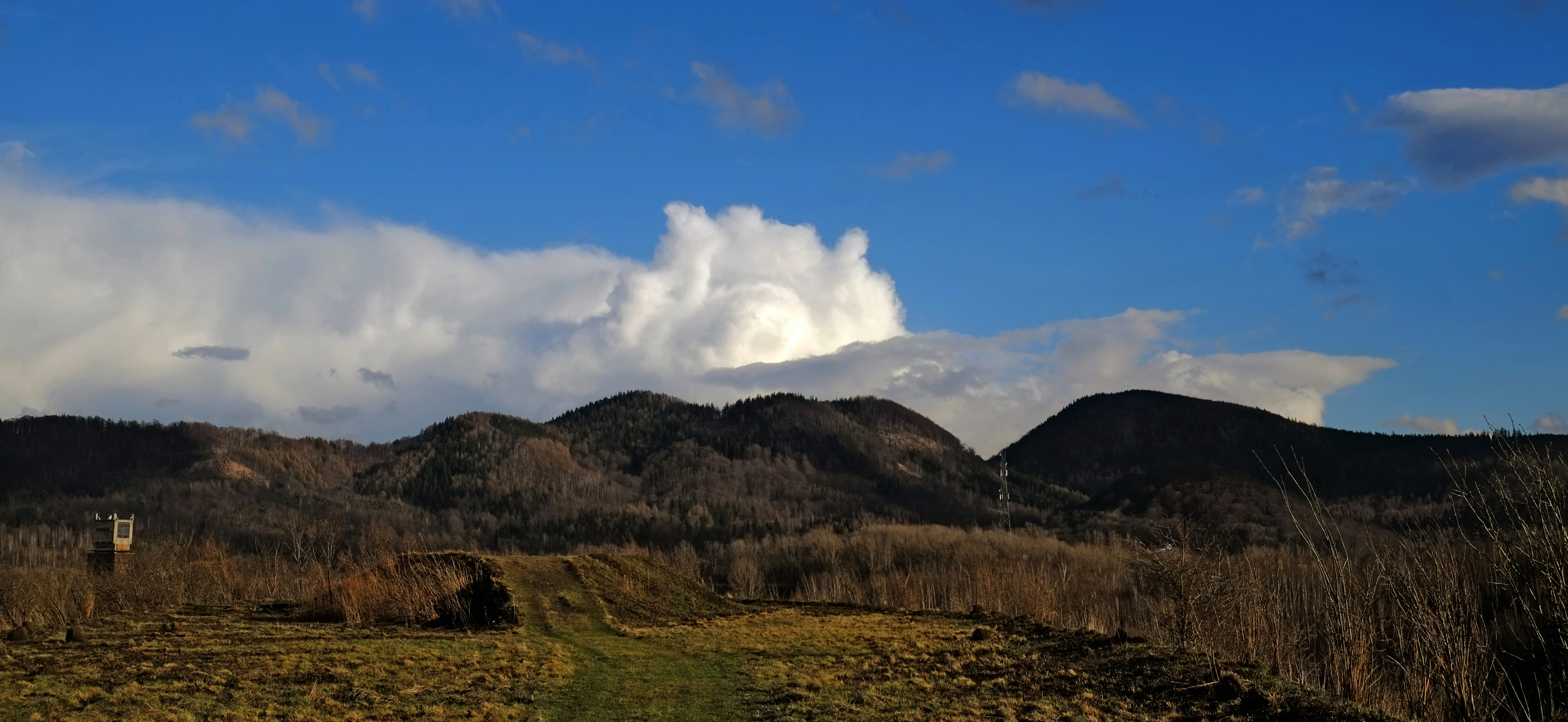 Park krajobrazowy Park Krajobrazowy Sudetów Wałbrzyskich.